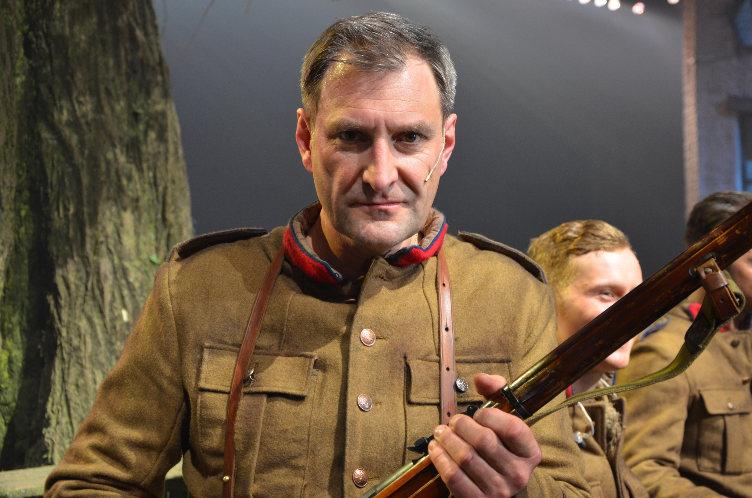 Peter Van De Velde tijdens de open repetitie van de spektakelmusical 14-18.